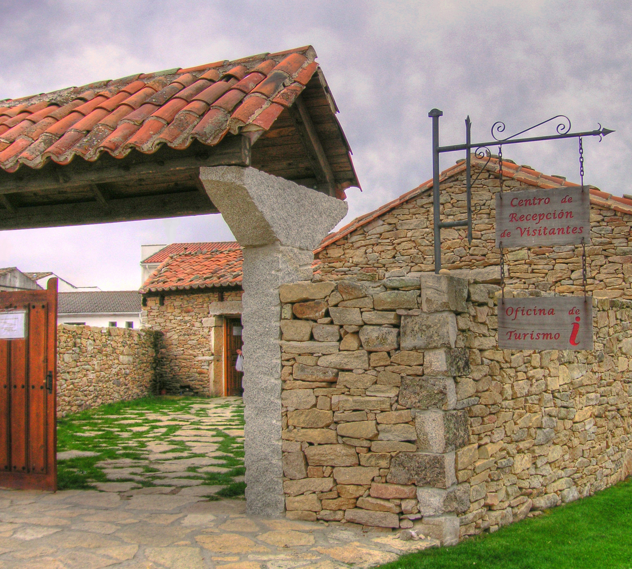 Fotografía del centro de recepción de visitantes del Parque Natural Arribes del Duero situado en el municipio de Trabanca (Salamanca, España).